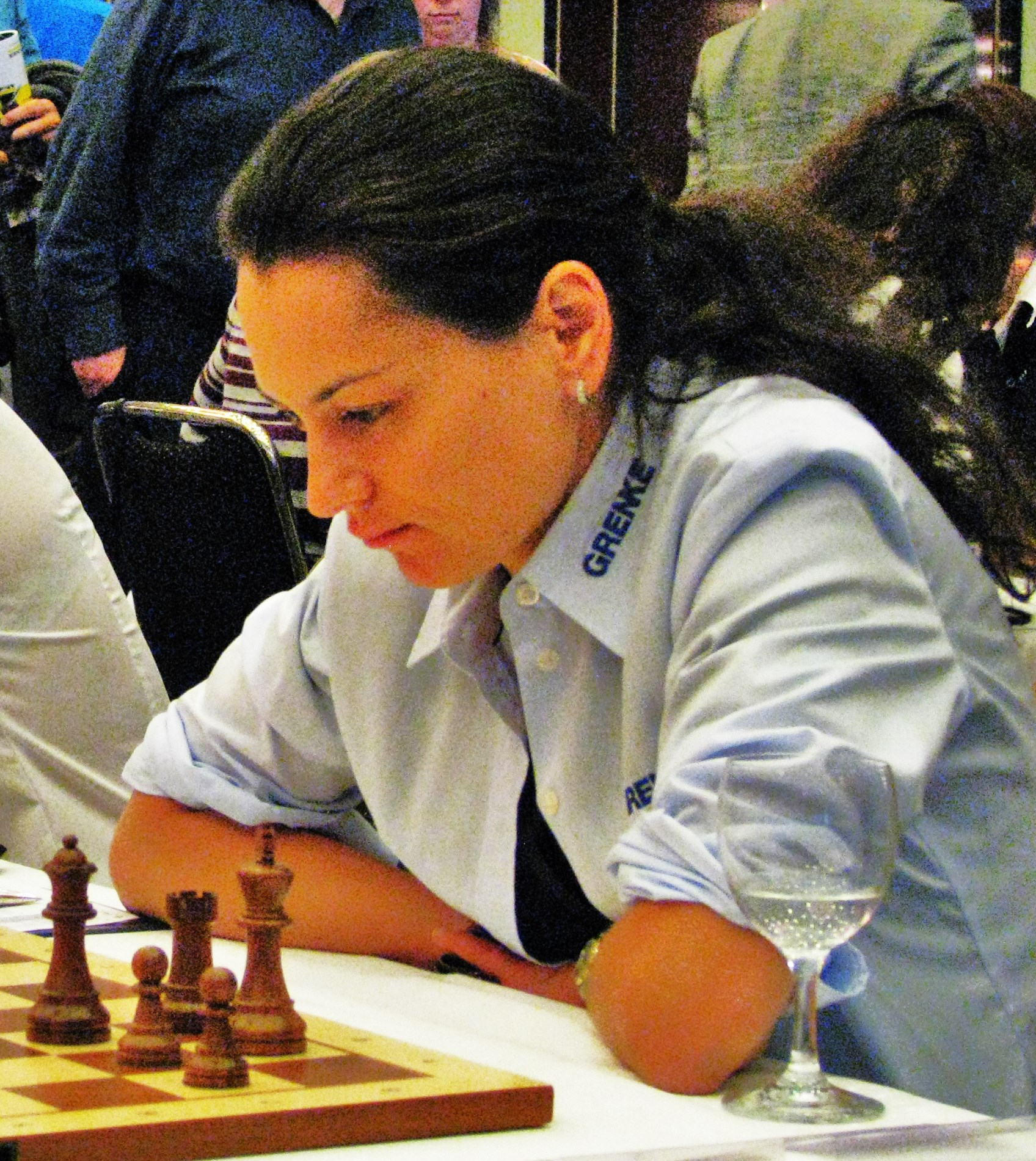 Alexandra Kostenjuk für die OSG Baden-Baden bei der Bundesliga-Finalrunde 2017 in Berlin